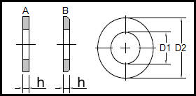 DIN 125